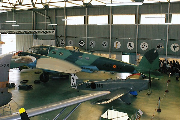 CASA 2111H Pedro (license built Heinkel He111H-16) of EdA, 4/10.